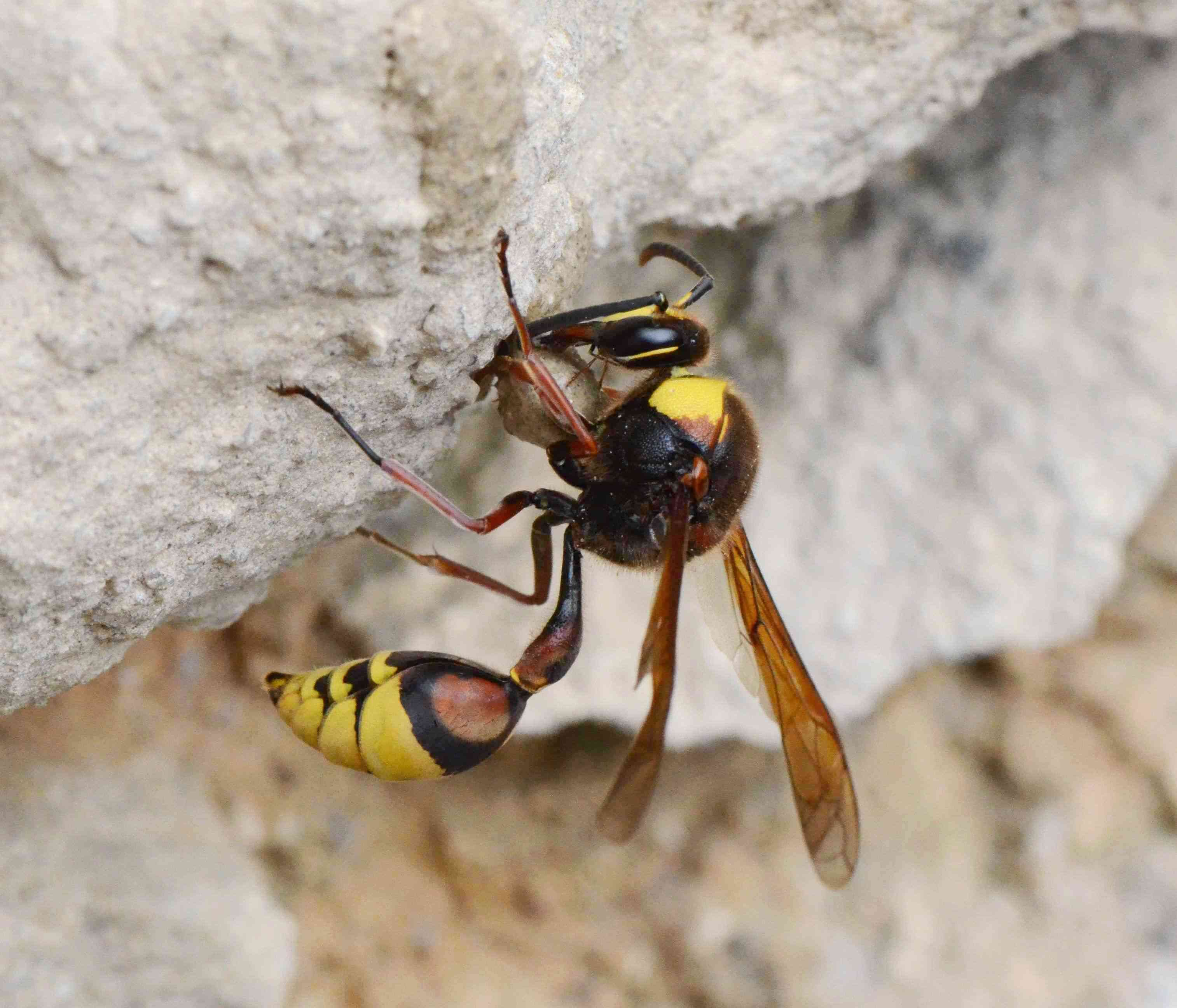 Delta unguiculata, guêpe maçonne, dans un jardin à Boutiers près de Cognac (Charente, France)